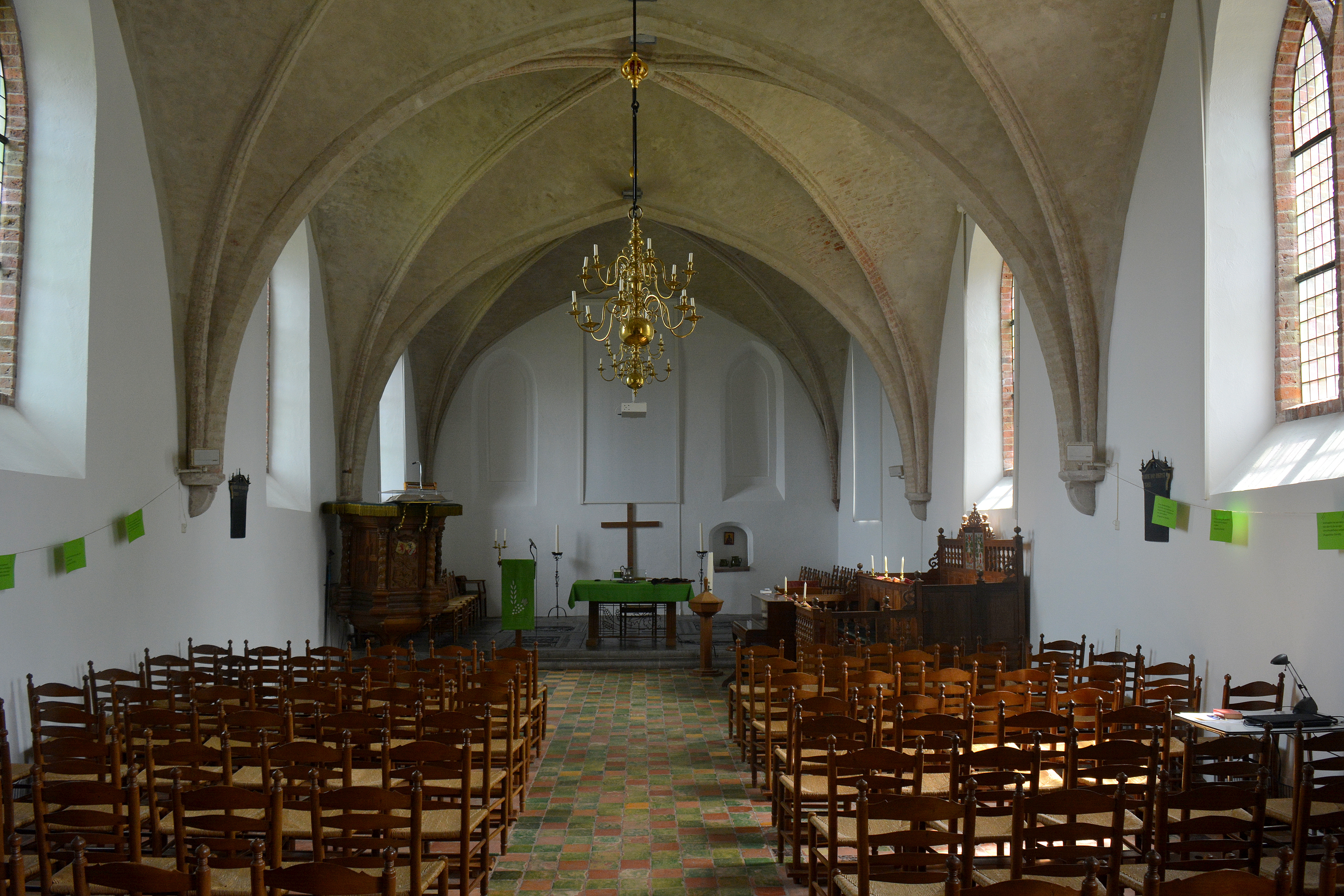 Augustinusga, Augustinuskerk, interieur